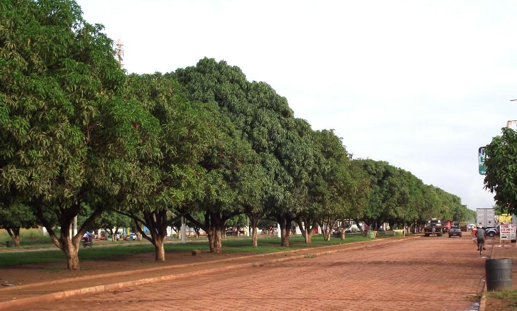 Avenida arborizada com mangueiras em Dom Elizeu, estado do Pará, Brasil.